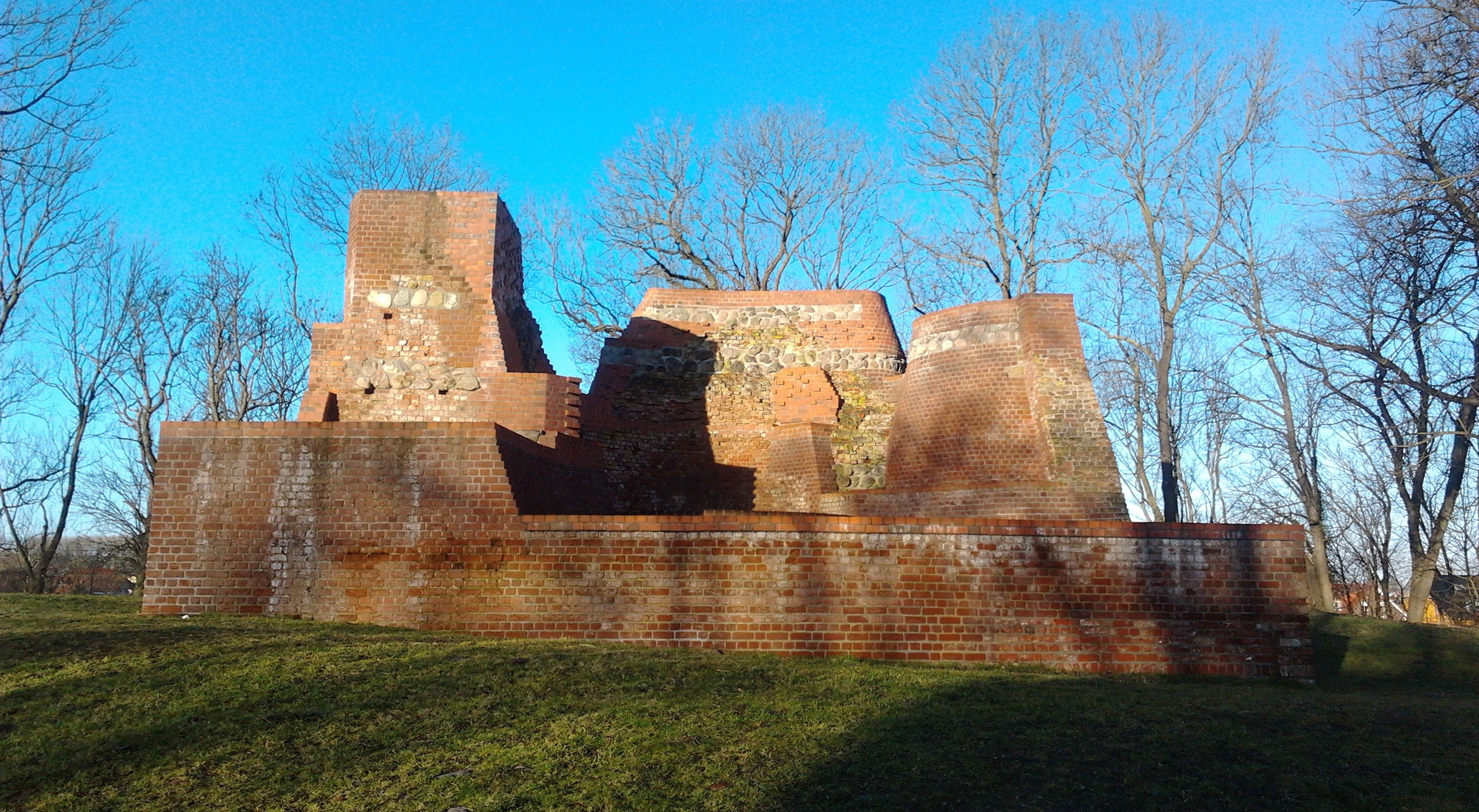 Haus Demmin, Burgruine von Osten